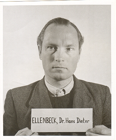 Hans Dieter Ellenbeck (1912-1992) at the Nuremberg Trials. Ellenbeck was SS-Member and SS-Sturmbannführer in SS-Führungshauptamt. This photograph of Ellenbeck (probably as a witness) was taken by US Army photographers on behalf of the Office of the U.S. Chief of Counsel for the Prosecution of Axis Criminality (OUSCCPAC, May 1945 - Oct. 1946) or its successor organization, the Office of Chief of Counsel for War Crimes (OCCWC, Oct. 1946 - June 1949).